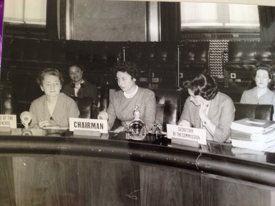 תמר אשל, יושבת ראש הועדה למעמד האישה באו"ם, ג'נבה, 1961.